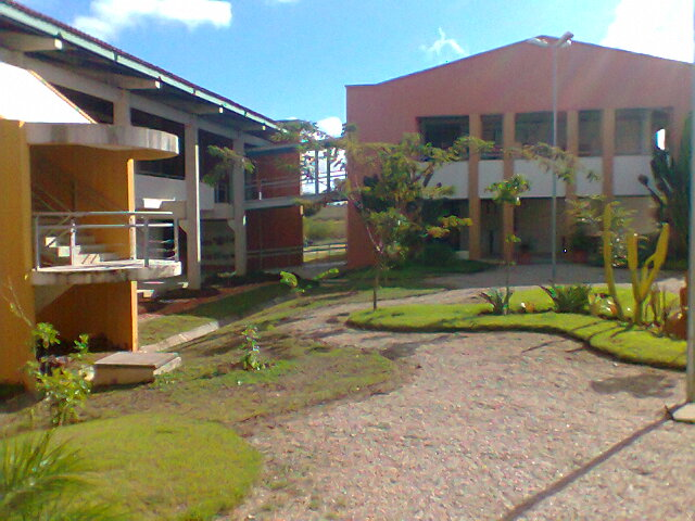 UFPE Centro Acadêmico do Agreste - Caruaru - PE / Brazil